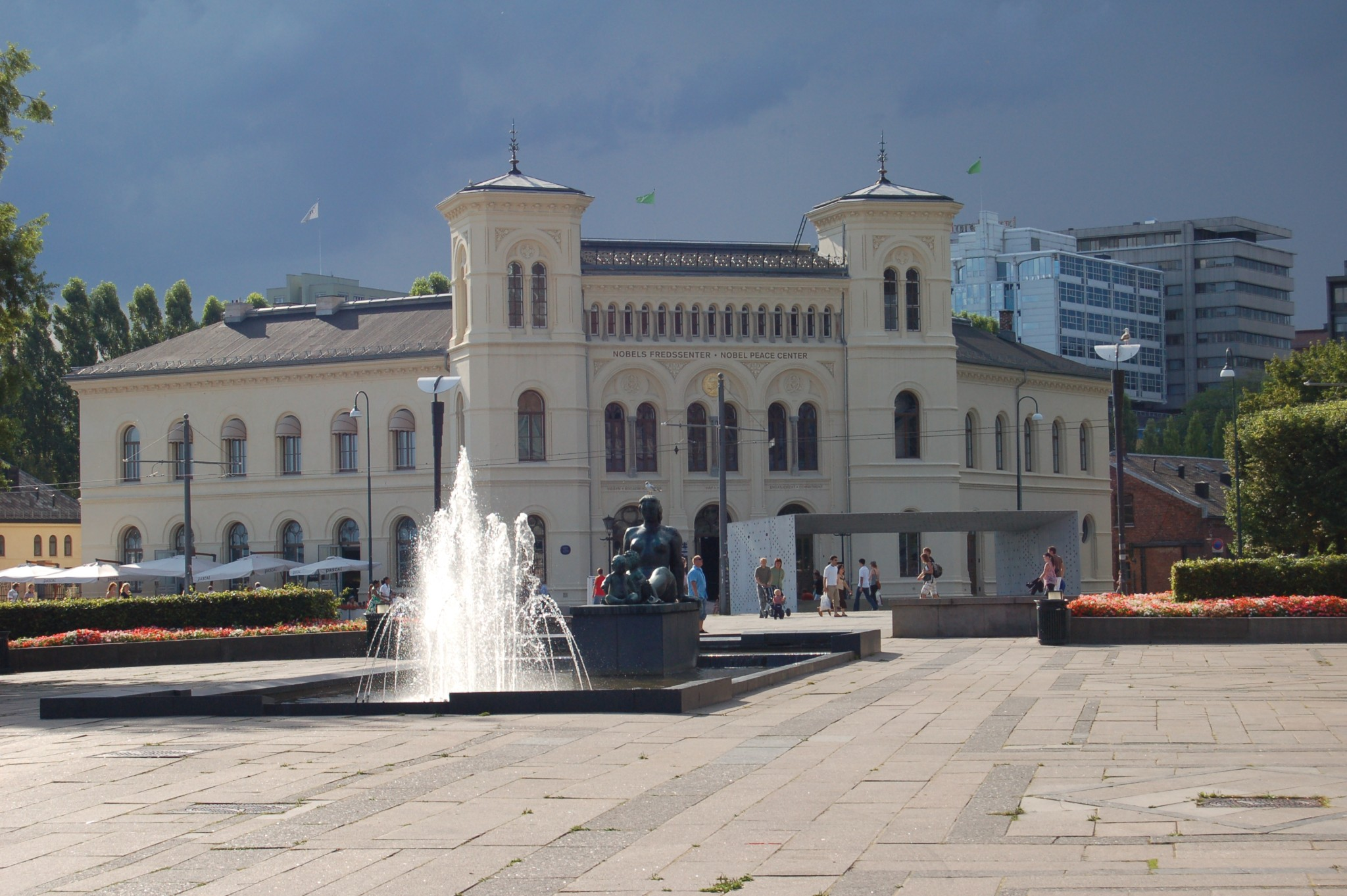 29. juli 2006 Norge, Oslo, Rådhusplassen, Nobels Fredssenter